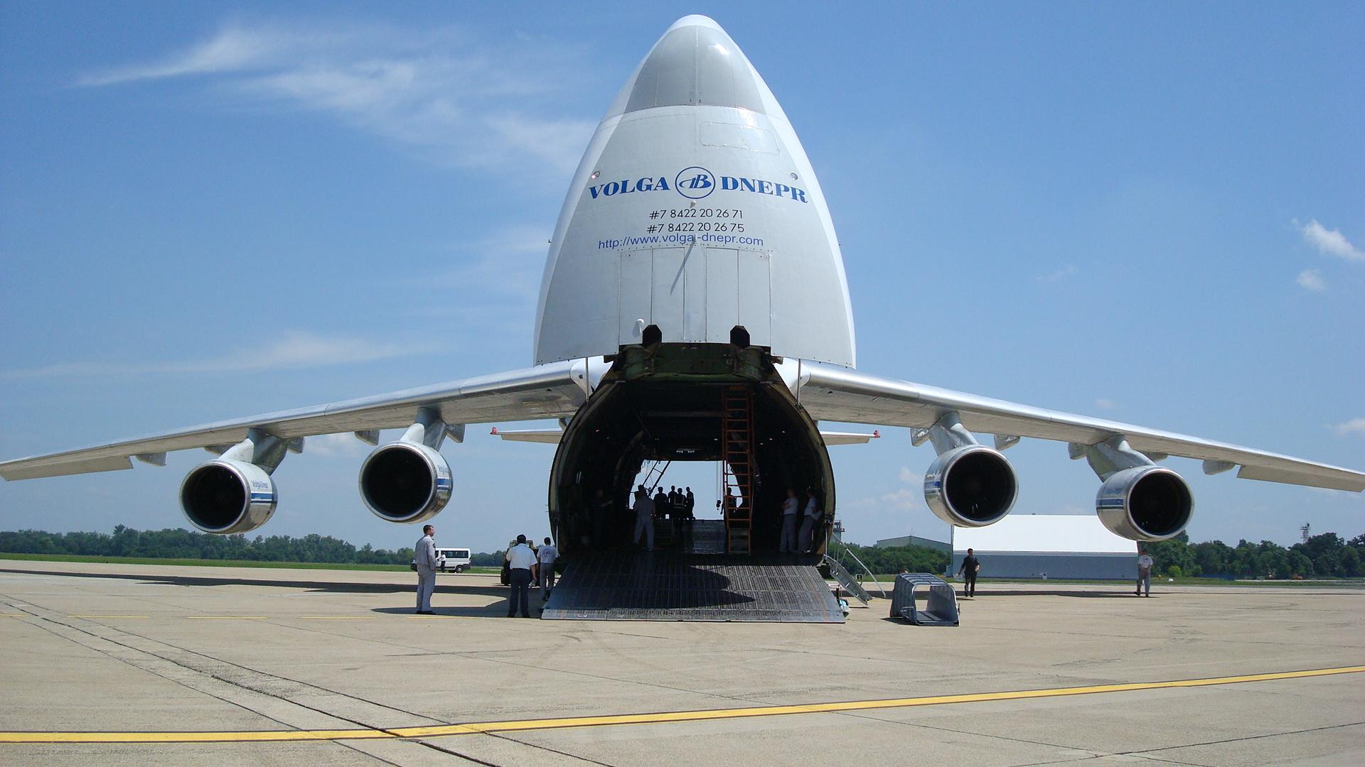 Antonov An-124 forward view